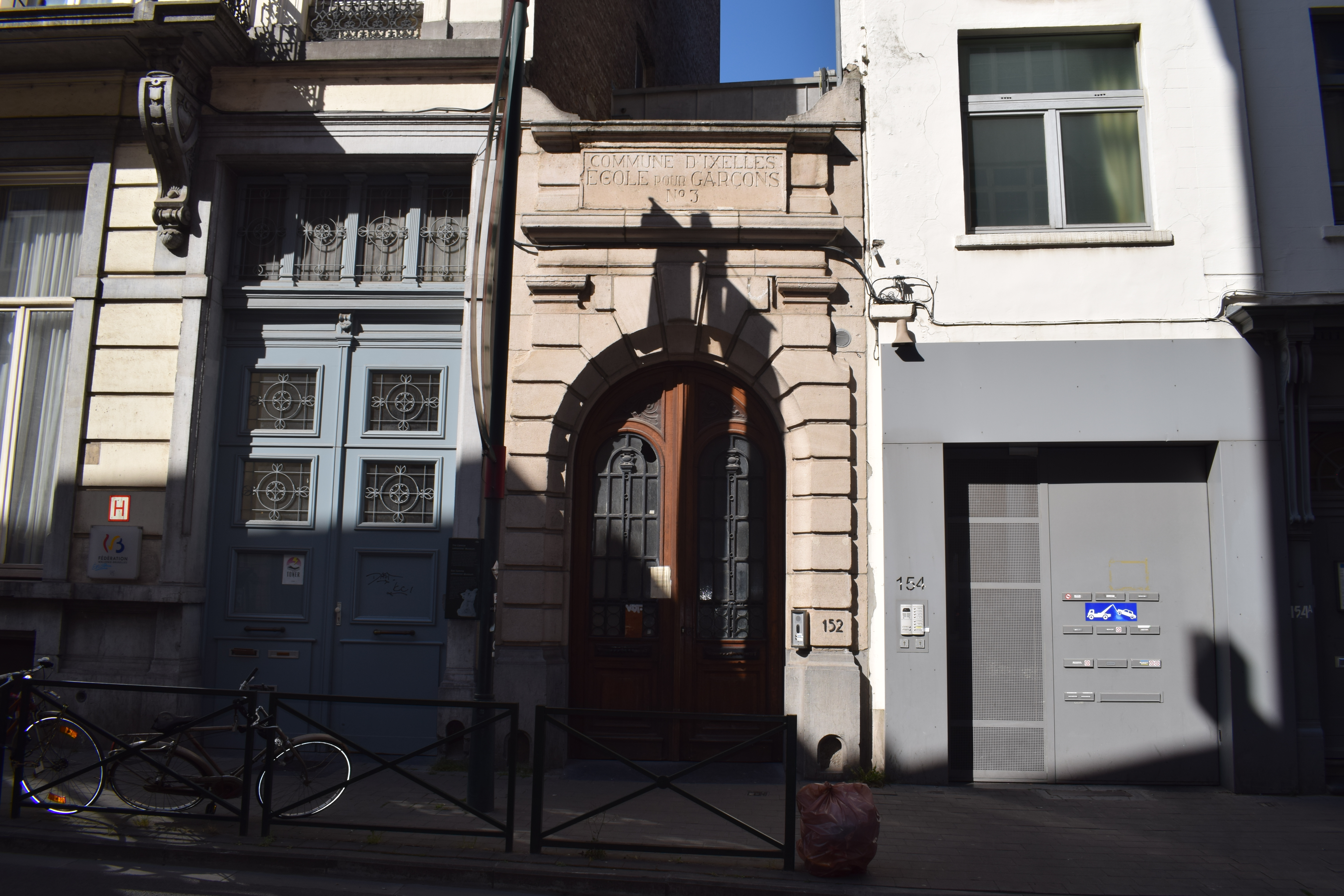 Athénée Charles Janssens entrée 29